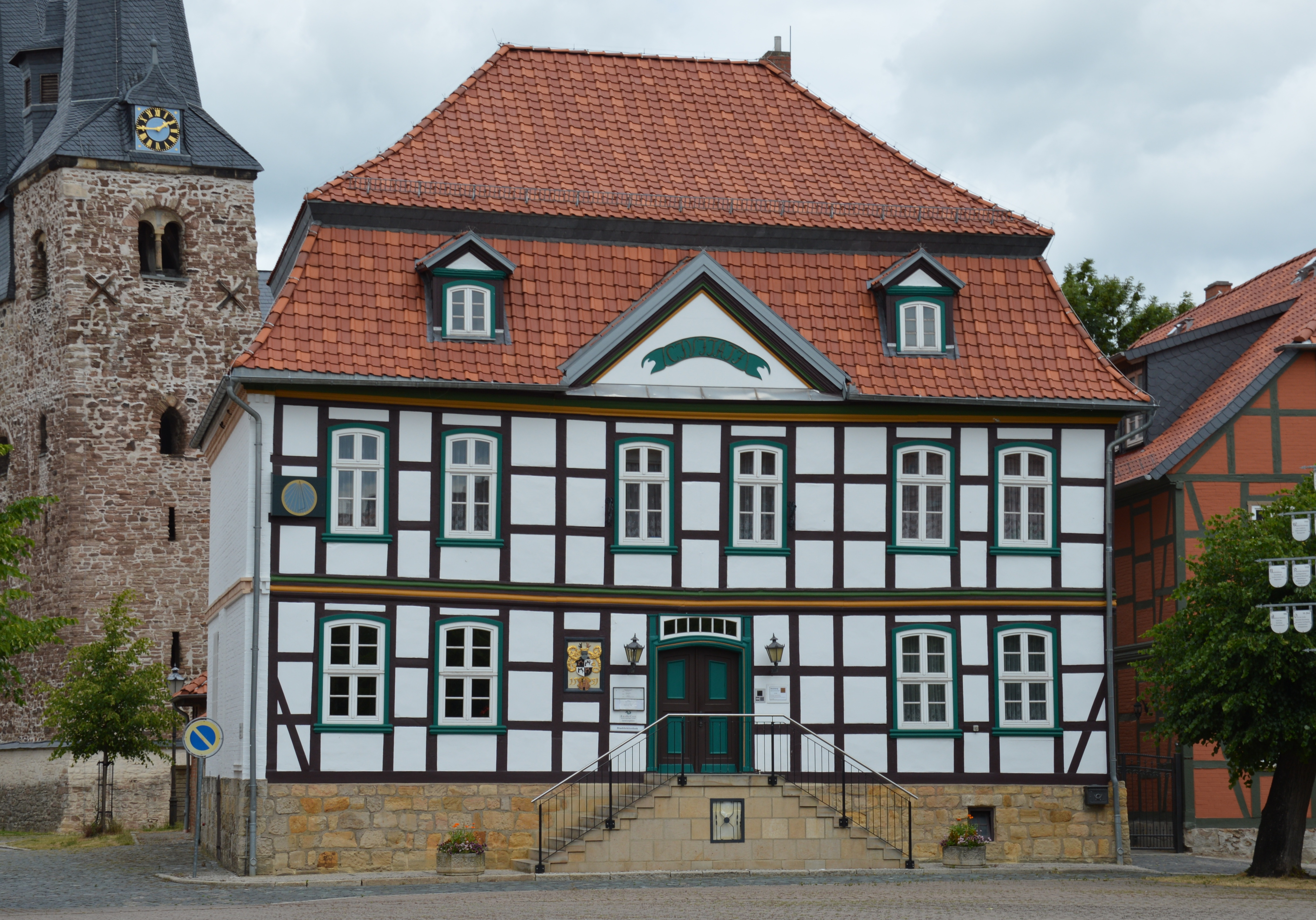 Rathaus Derenburg